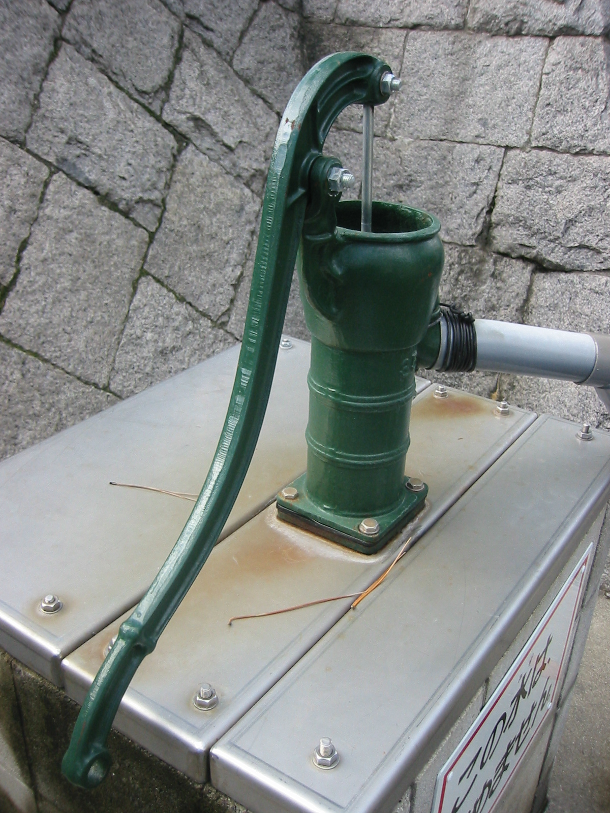 神戸市市東灘区石屋川の公園にある井戸ポンプ